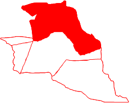 Ubicación de la parroquia Faría, municipio Miranda, estado Zulia, Venezuela